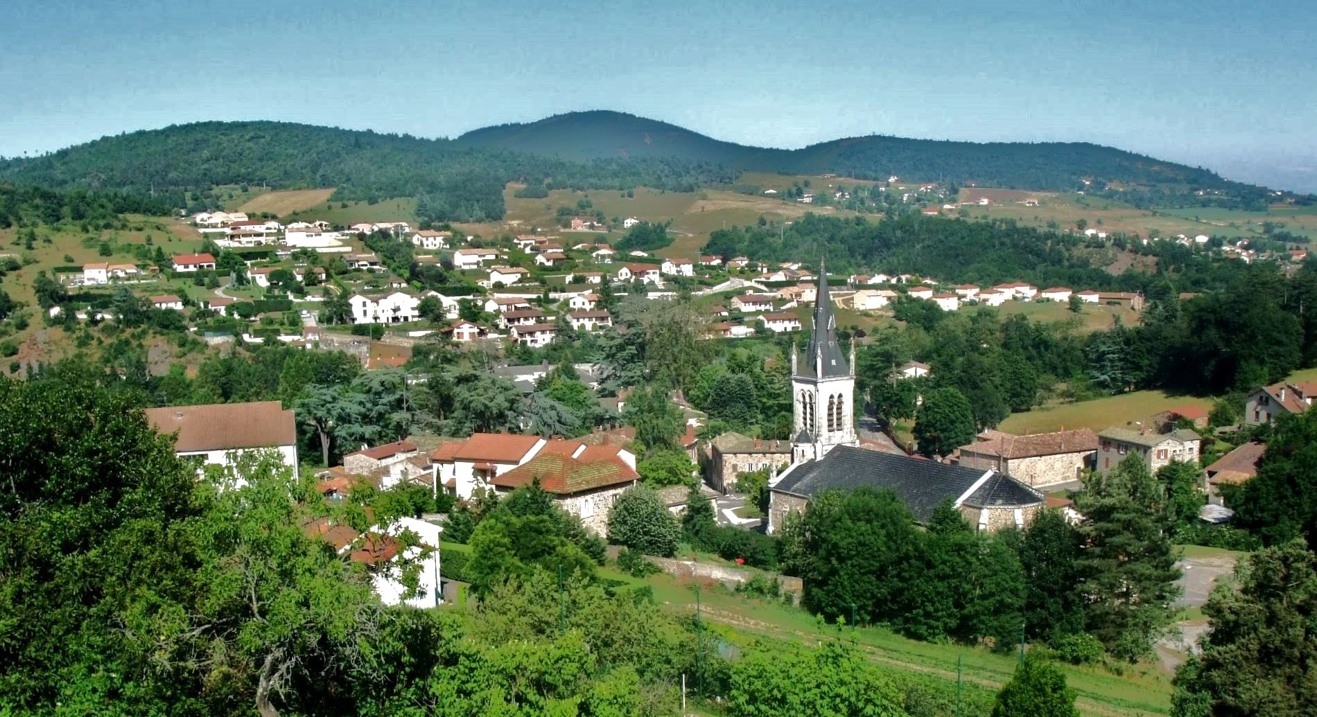 Saint-Marcel-lès-Annonay vue générale